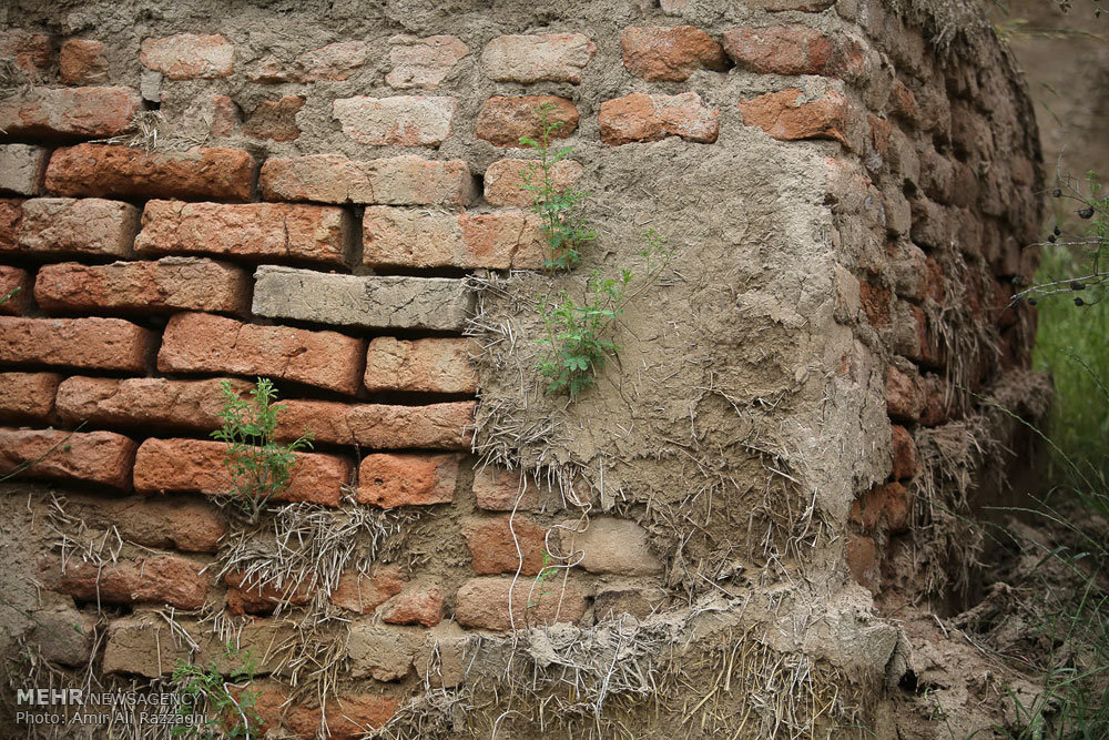 دیوار بزرگ اسکندر یا دیوار سرخ که در متون قدیمی با نام مار سرخ نیز نامیده‌شده‌است ، دیواری تاریخی است که از کنار دریای خزر در ناحیه گمیشان آغاز شده و تا کوه‌های گلیداغ در شمال شرق کلاله ادامه می‌یافته‌است. هم‌اکنون تقریباً تمام این دیوار از میان رفته‌است و تنها بخش‌های کوچکی از آن که در زیر خاک مدفون مانده، باقی است. دیوار تاریخی گرگان پس از دیوار چین (به طول شش هزار کیلومتر) ، بزرگترین دیوار دفاعی جهان است. این دیوار عظیم تاریخی که ۲۰۰ کیلومتر طول دارد در ۲۹ تیرماه سال ۱۳۷۸ به ثبت ملی رسیده‌است.